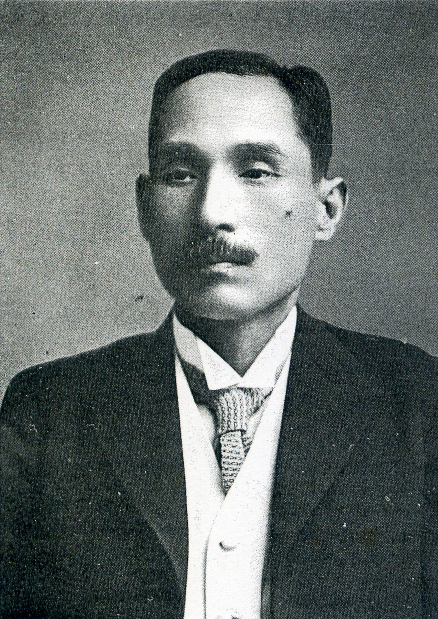 この写真は、本田義成（1871-1952）の写真です。